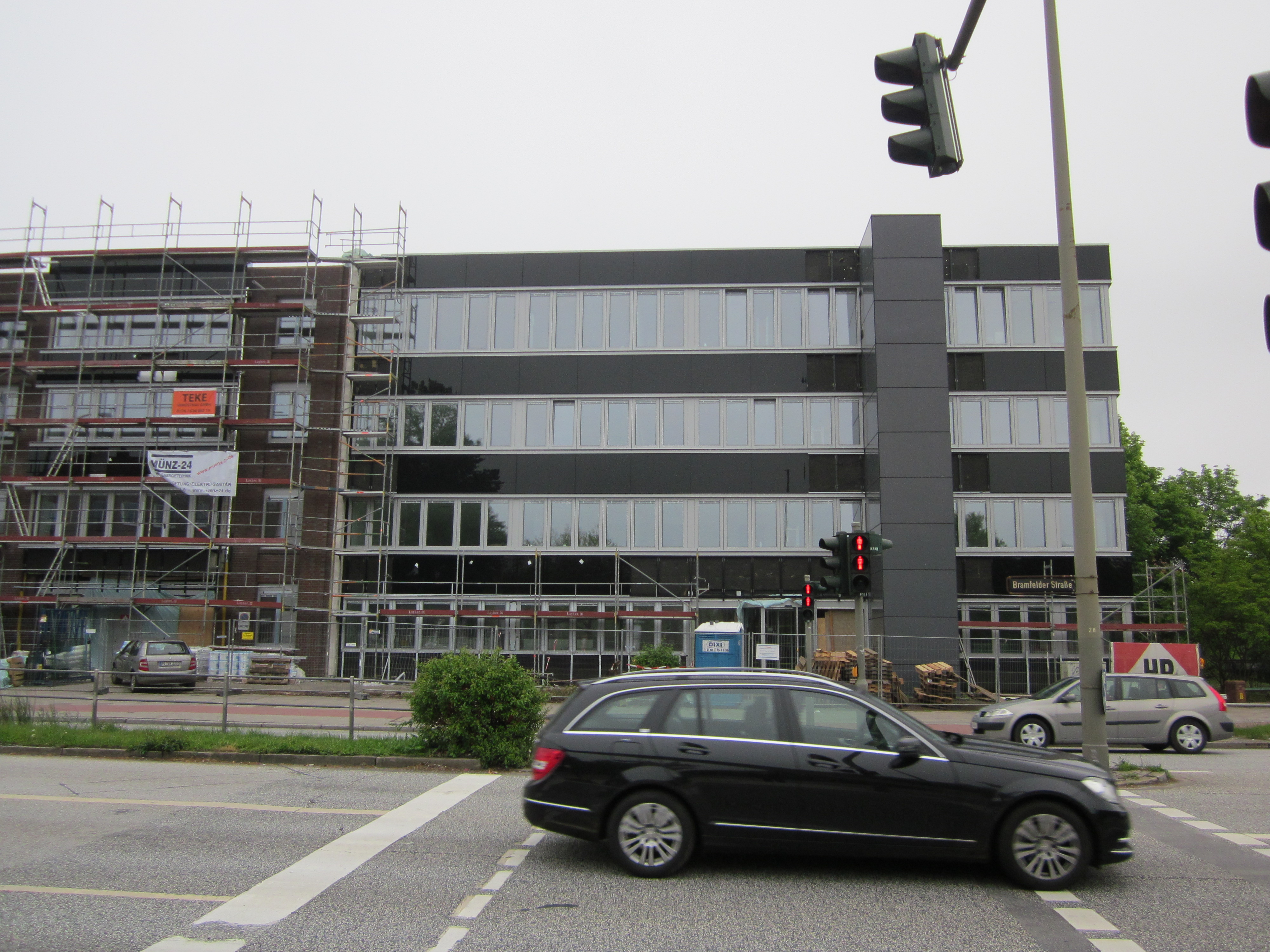 Bürohaus von Plan International an der Bramfelder Straße (Ecke Krausestraße) in Barmbek-Nord